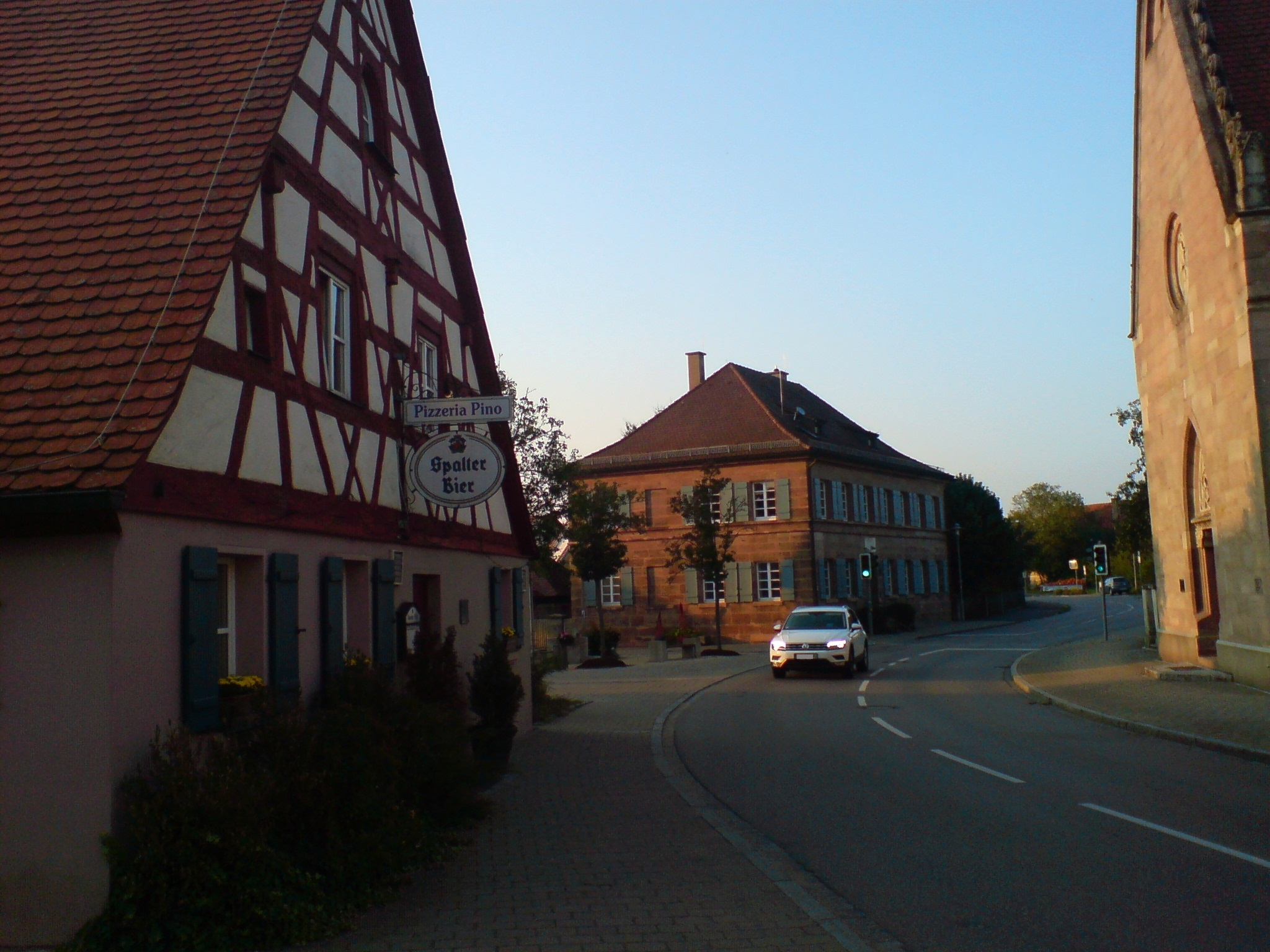 Leerstetten Hauptstraße 4 und 16, Witshaus Anfang 18. Jhd, Schulhaus von 1836, rechts die Westfassade der Kirche